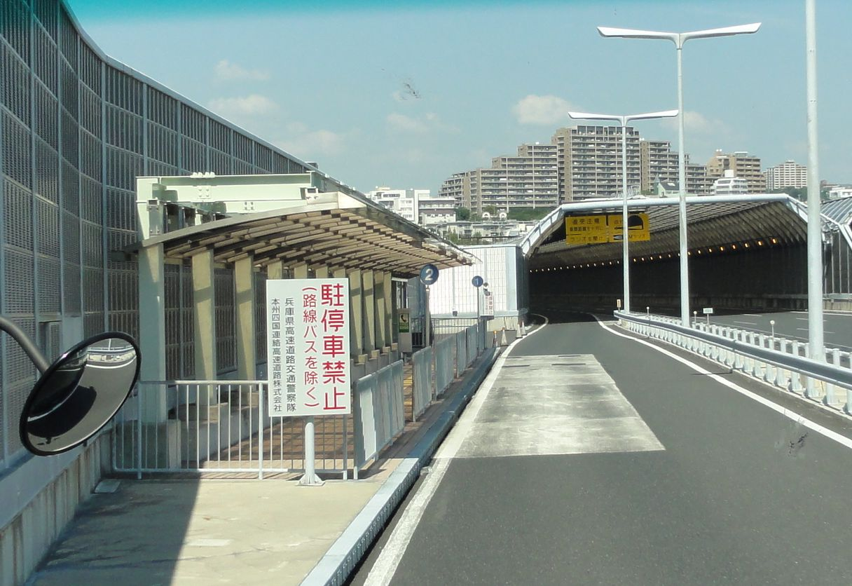 高速舞子バスストップ 降車場